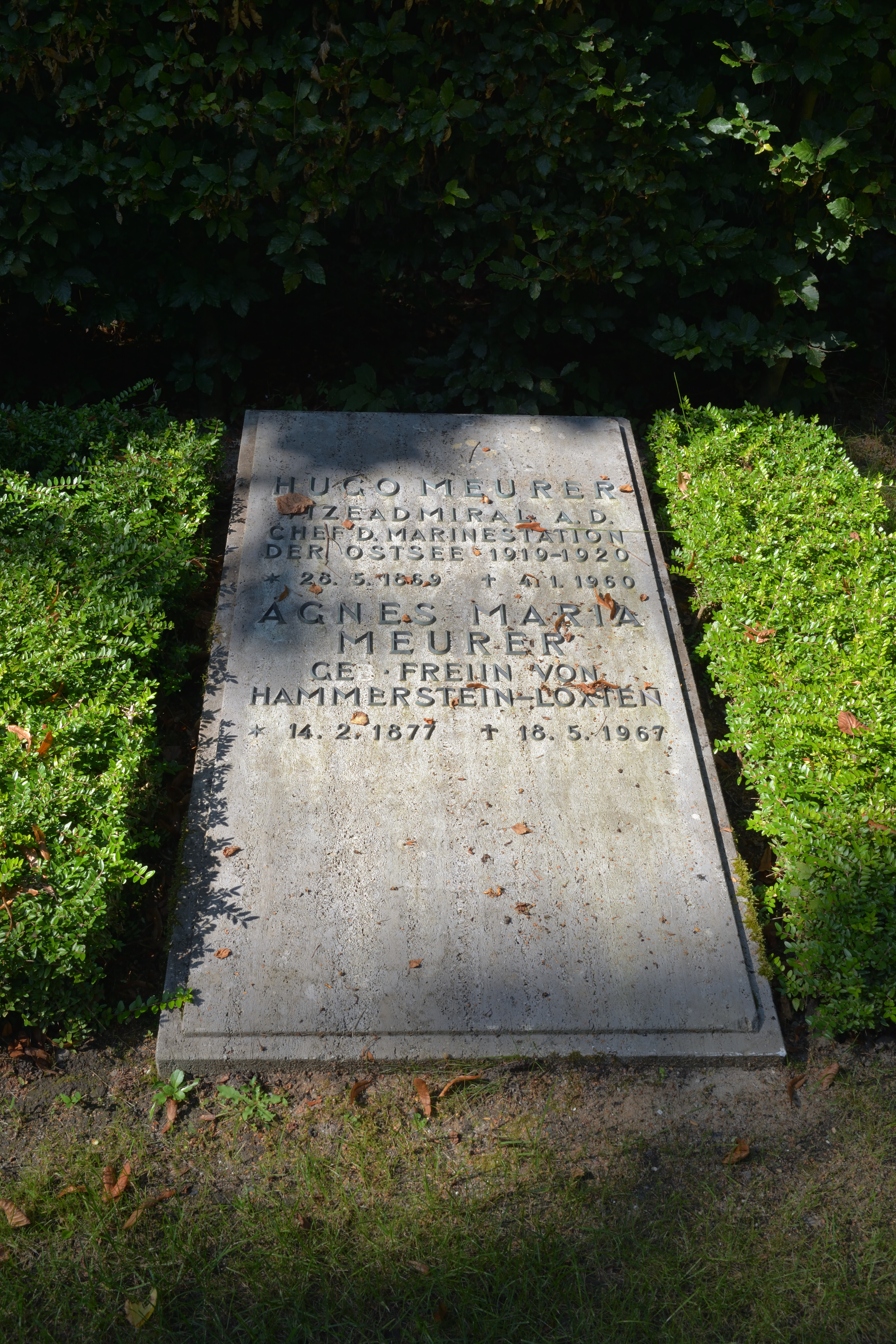 Impressionen aus dem Nordfriedhof in Kiel Ein Grossteil diese Friehofes ist den Gefallenen der beiden Weltkrige gewidmet.